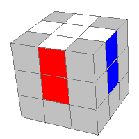 Kryds i toppen af en Rubik's Cube